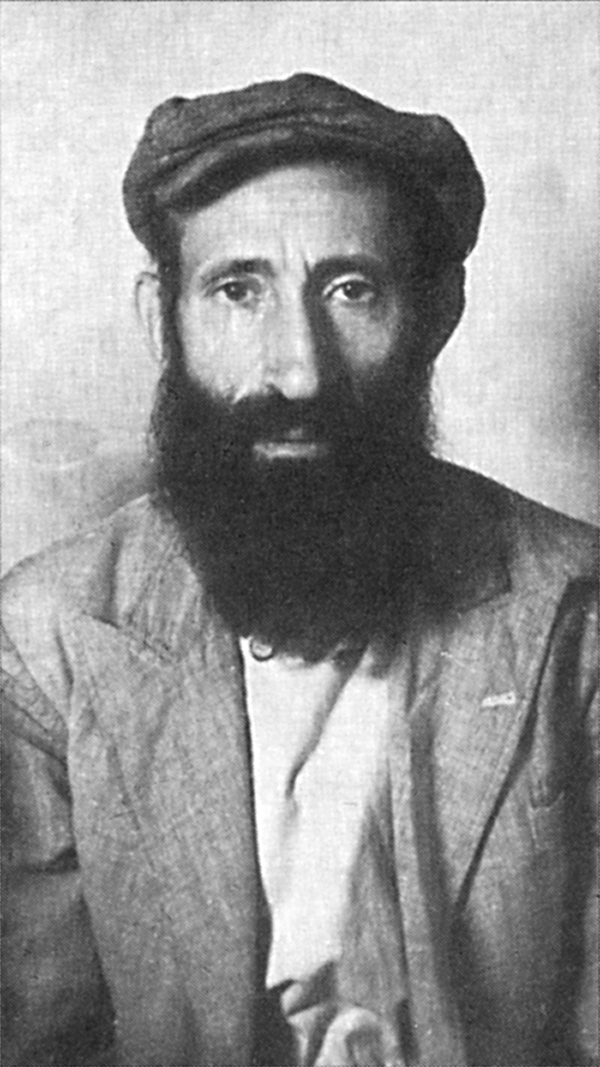 הרב סלמאן מוצפי בצעירותו